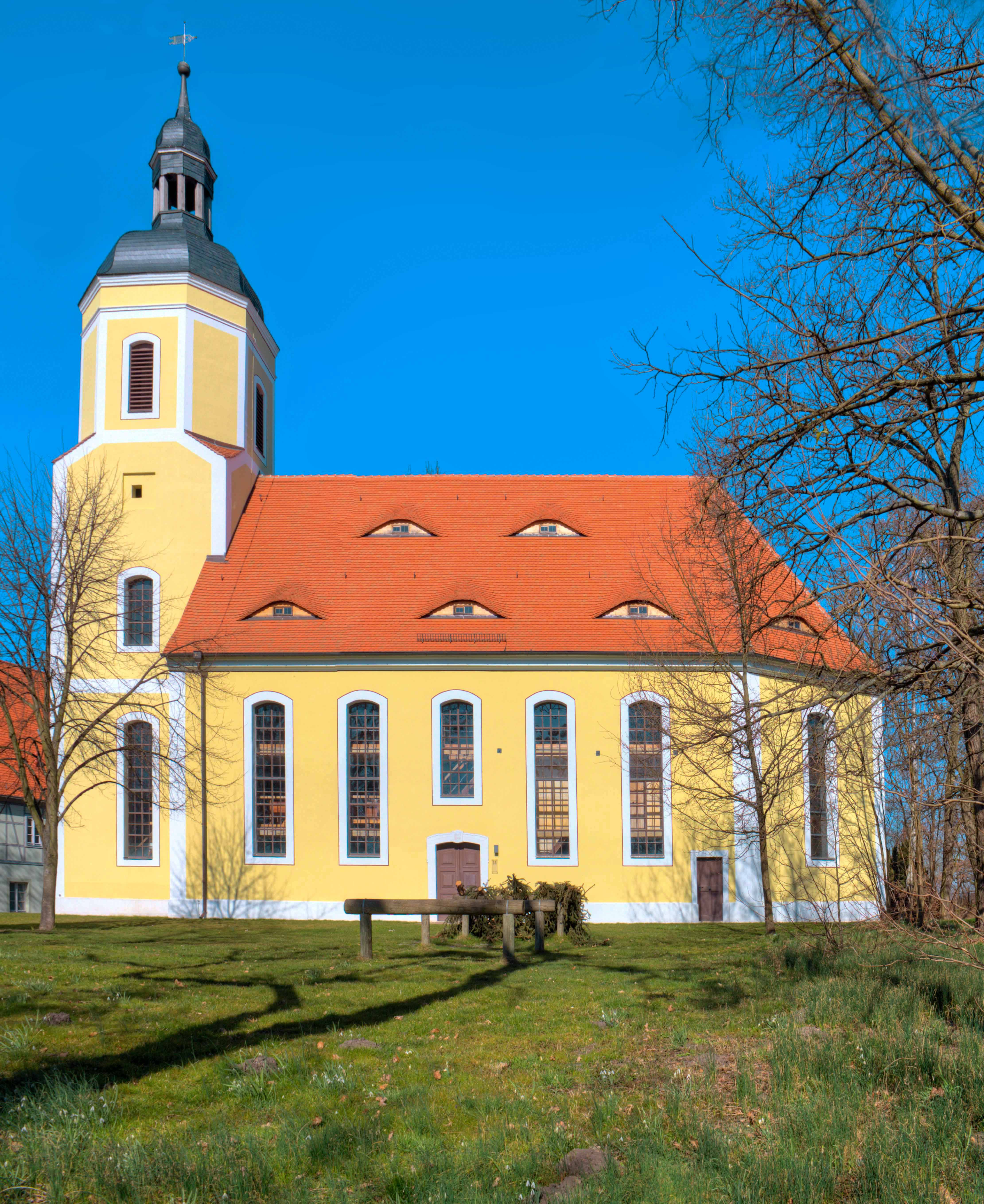 Kirche (1. Deutsche Radfahrerkirche), Lindenstraße 3 in Torgau OT Weßnig